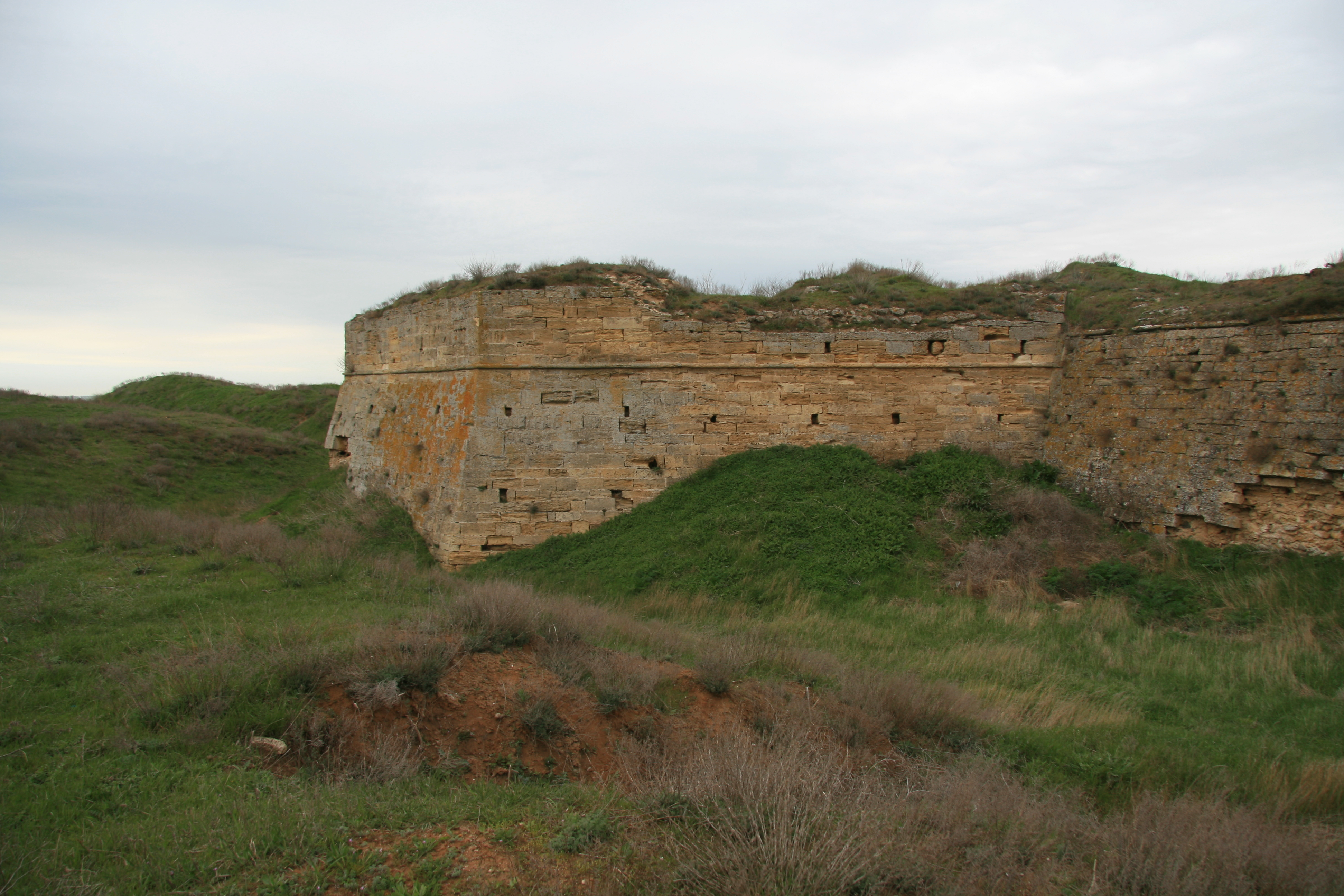 Арабатська захисна лінія, Ленінський р-н